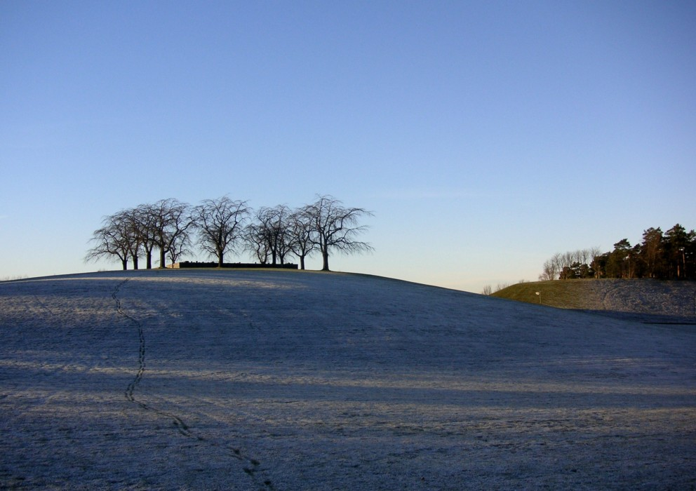 Minneslunden på Carl Milles Skokskyrkogården i Stockholm